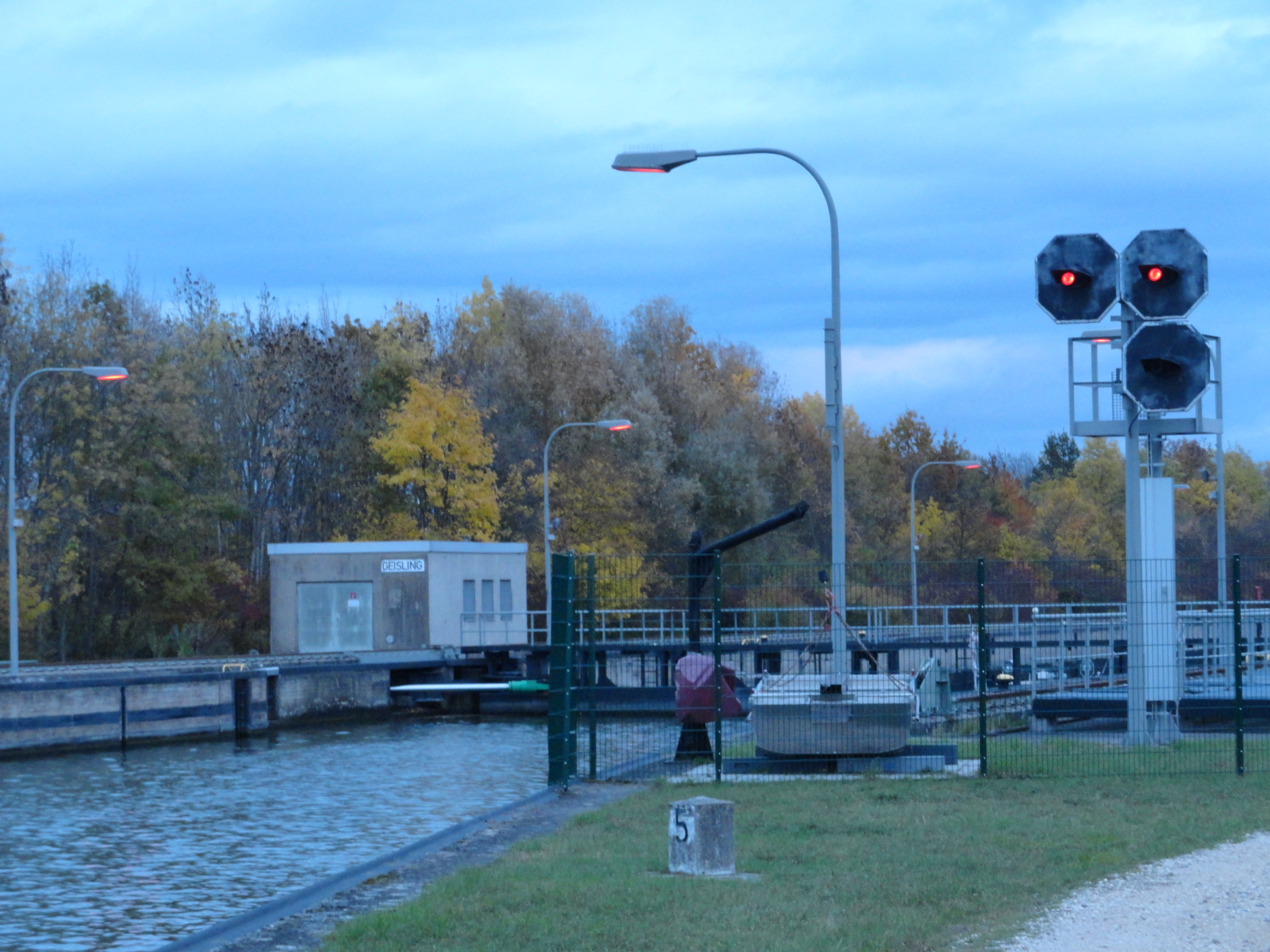 Schleuse Geisling an der Donau; Blick am Oberwasser Richtung Osten